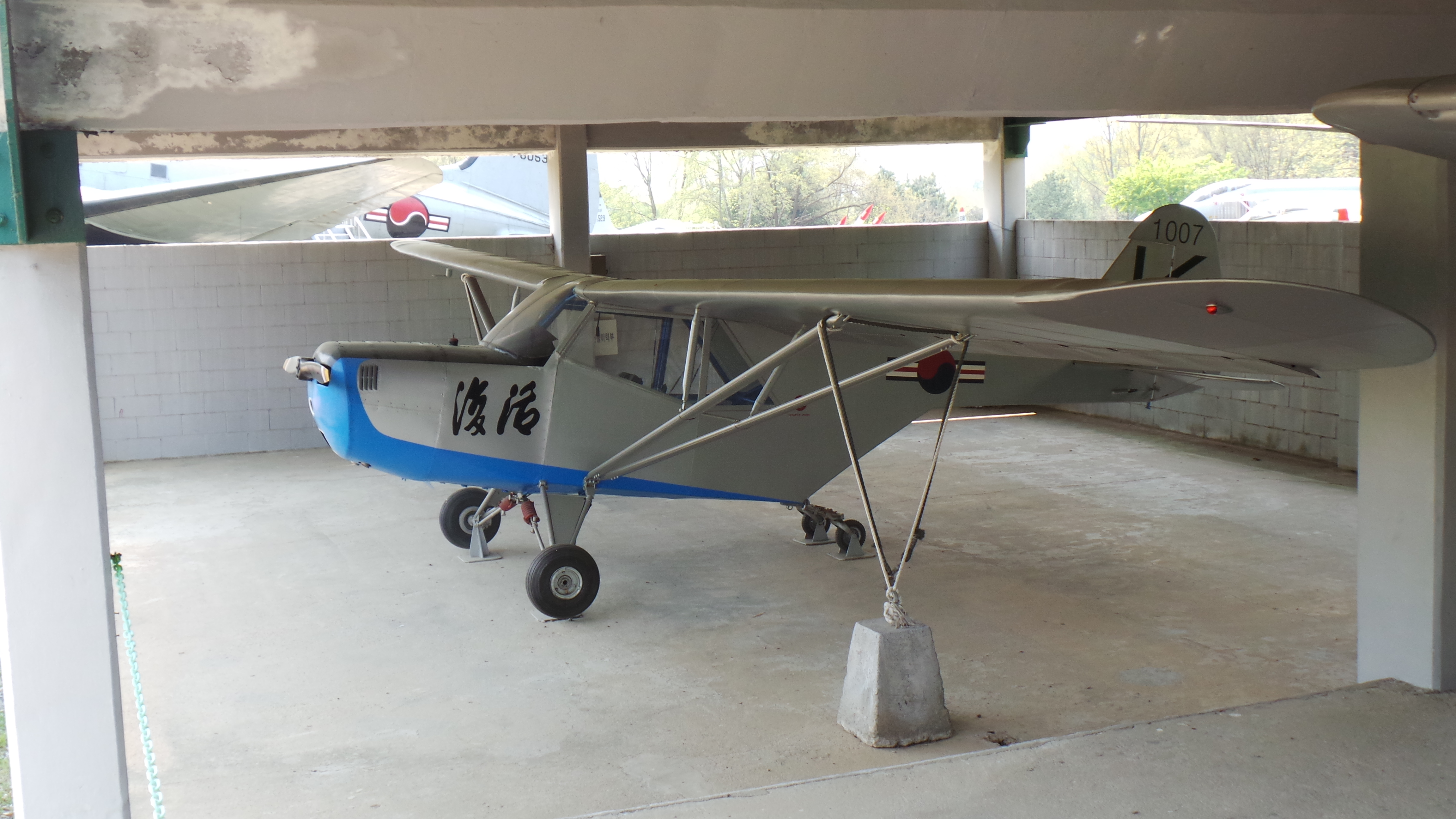 충북 청원군 공군사관학교 공군박물관에 전시된 2004년형 부활호